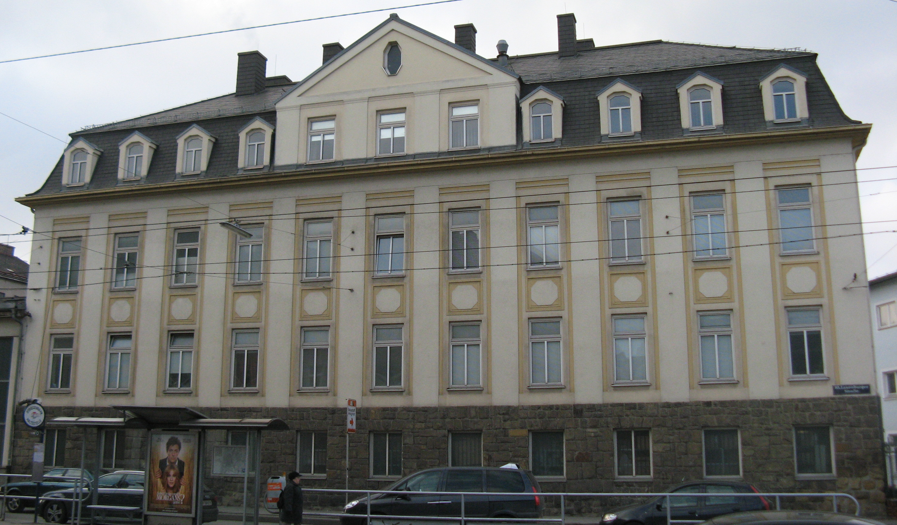 Verwaltungsgebäude der Österreichischen Bundesbahnen (um 1910), Laxenburger Straße 4, Wien-Favoriten